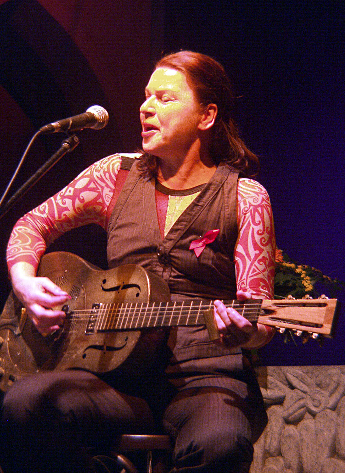 Inga Rumpf, 2004 bei einem Konzert in Hannover